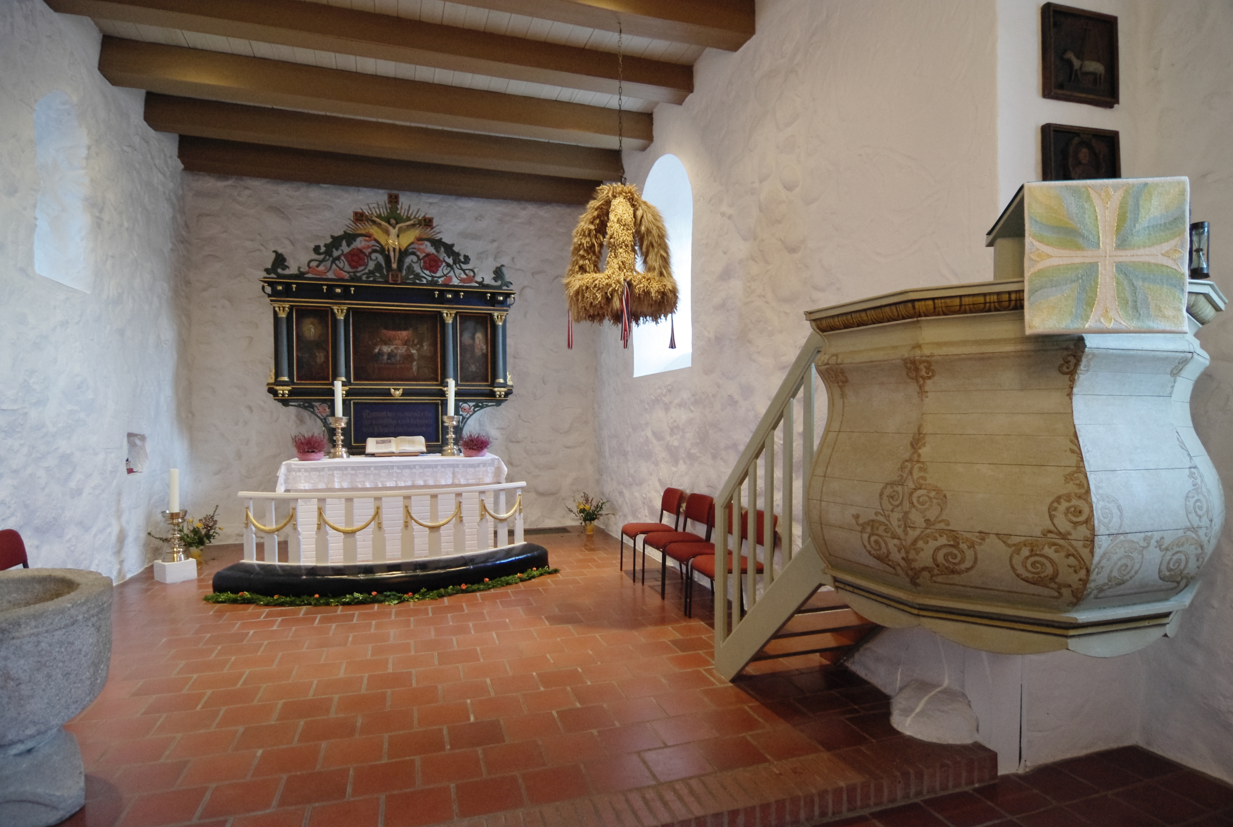 St. Annen zu Taarstedt, Kreis Schleswig-Flensburg. Chor mit Altar und Kanzel